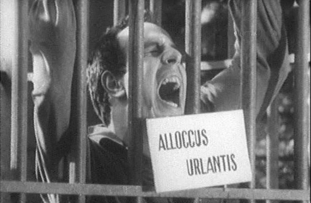 image from film "Allocco tra gli Angeli" of 1960